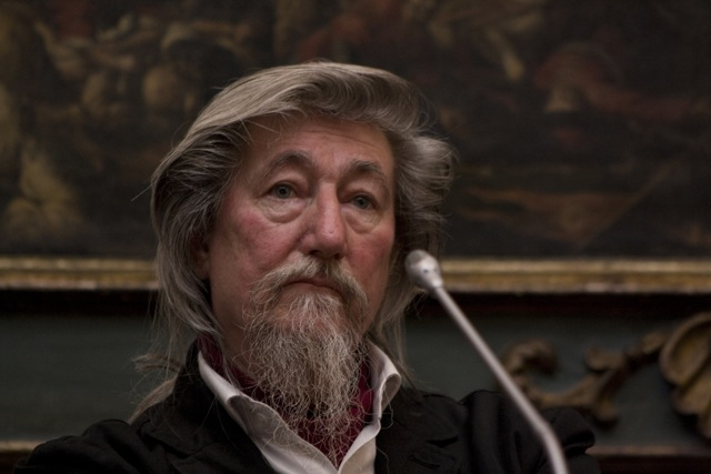 Giorgio Fornoni Mercoledì 13 aprile 2011